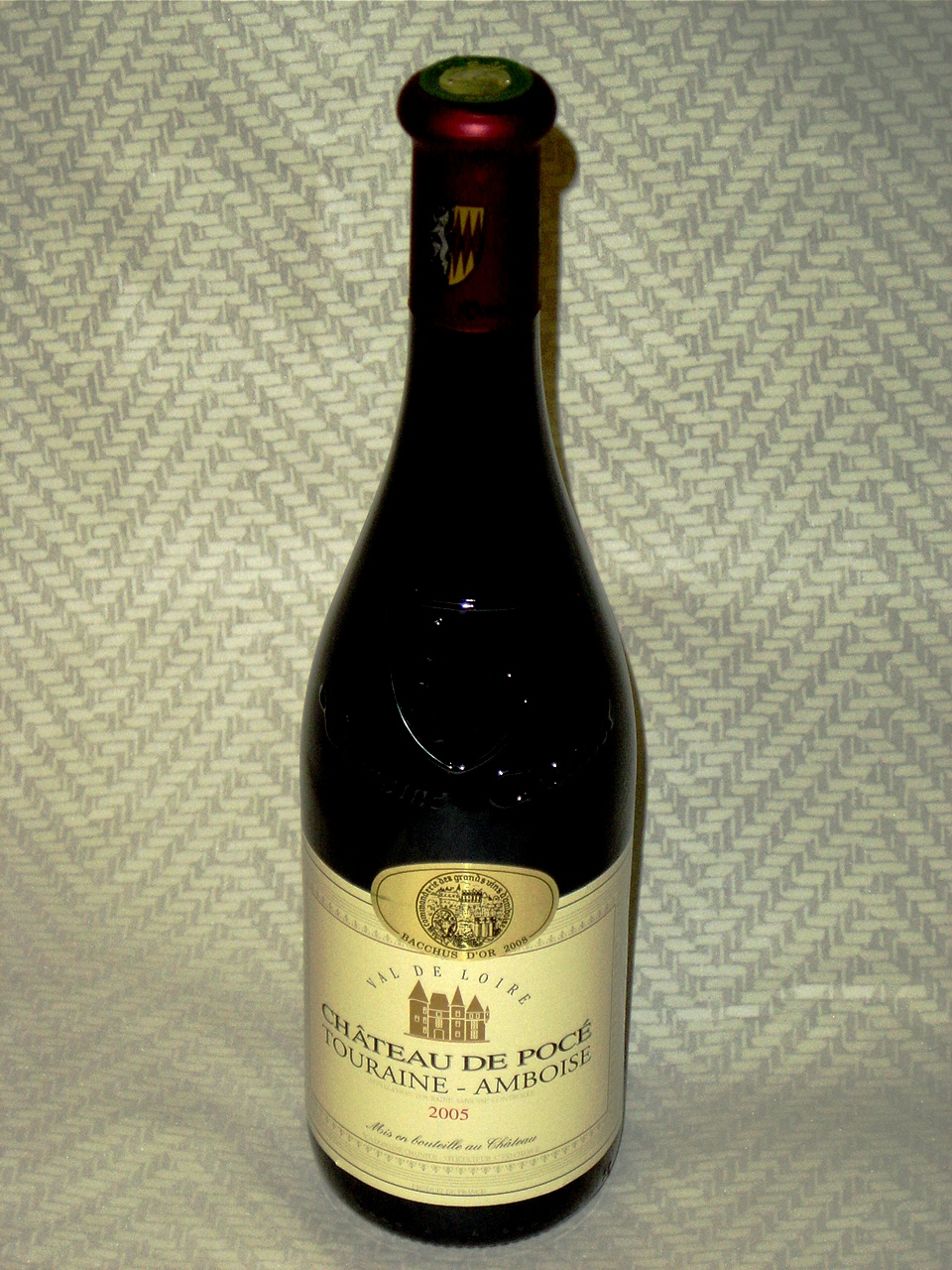 Bouteille de Touraine Amboise titrée Bachus d'Or - Indre et Loire